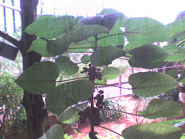 Dendrocnide moroides in Botanic Garden in Liberec